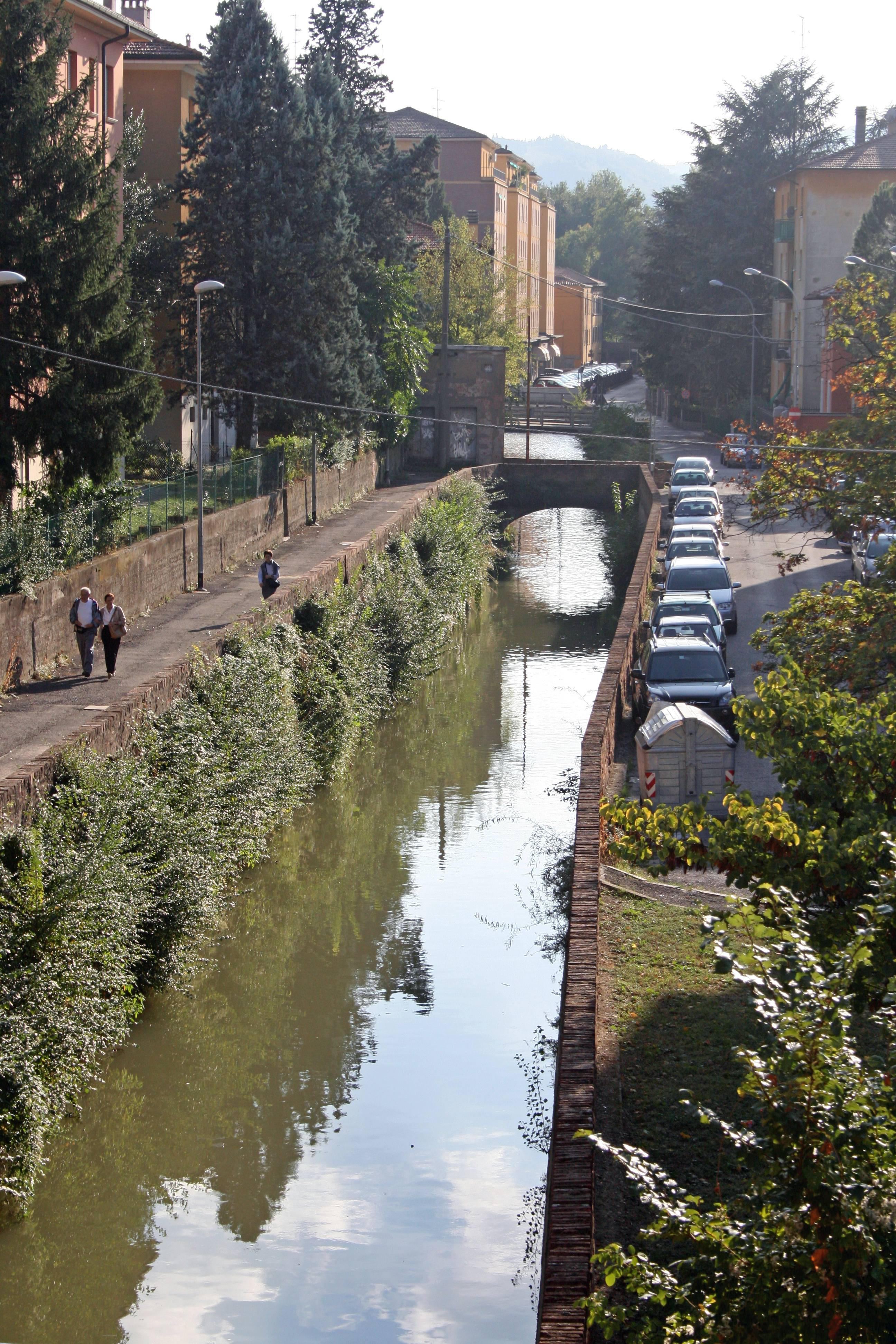 Canale di Reno nell'abitato di Casalecchio di Reno